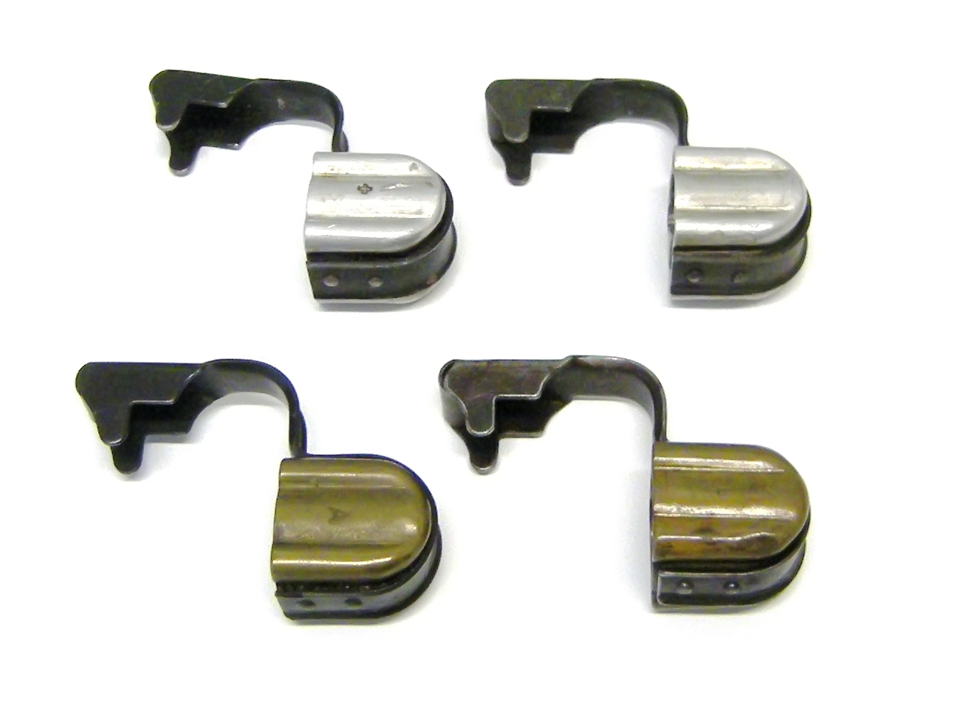 Couvre-canon (aluminium et laiton) du mousqueton 1931